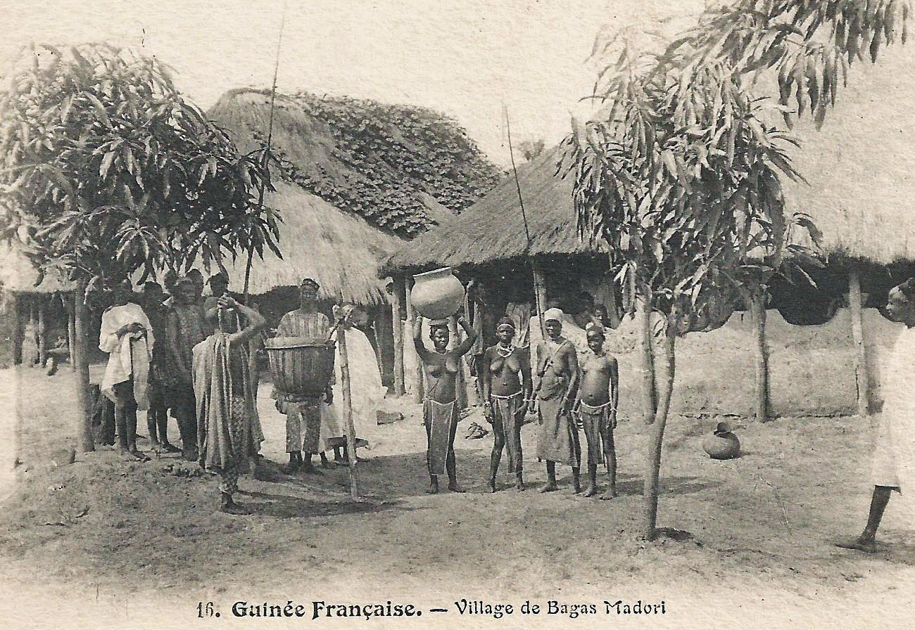 Village de Bagas Madori. A. Chevrier et Cie, Bordeaux Guinée française.